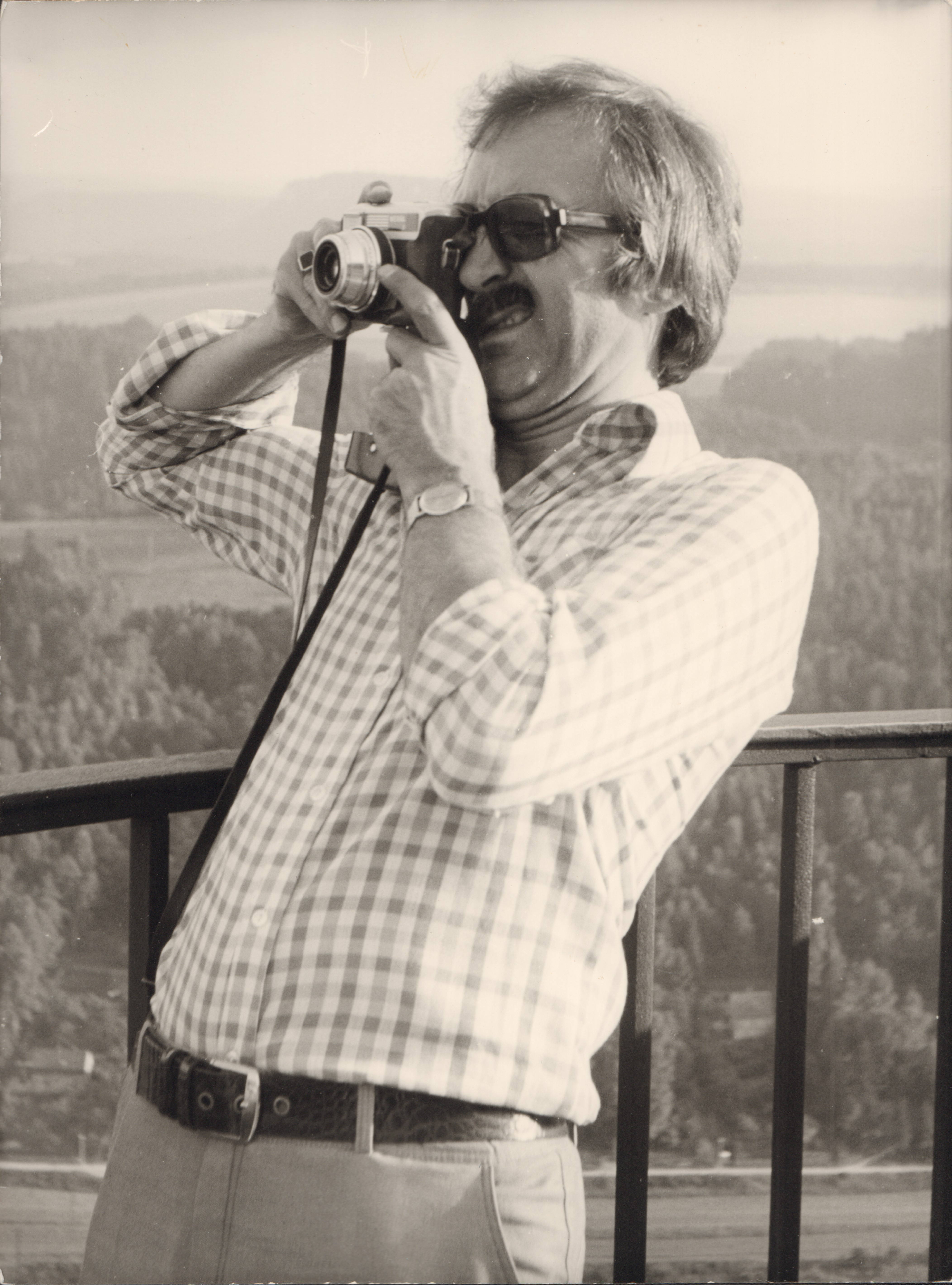 W. Guenther